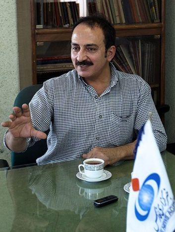 ابوالفضل جلیلی - ۱۳۹۱